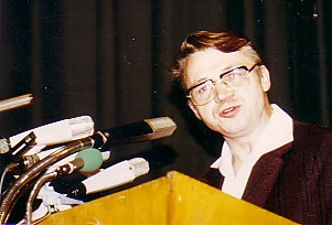 Rudolf Bahro auf einem Parteitag der Grünen